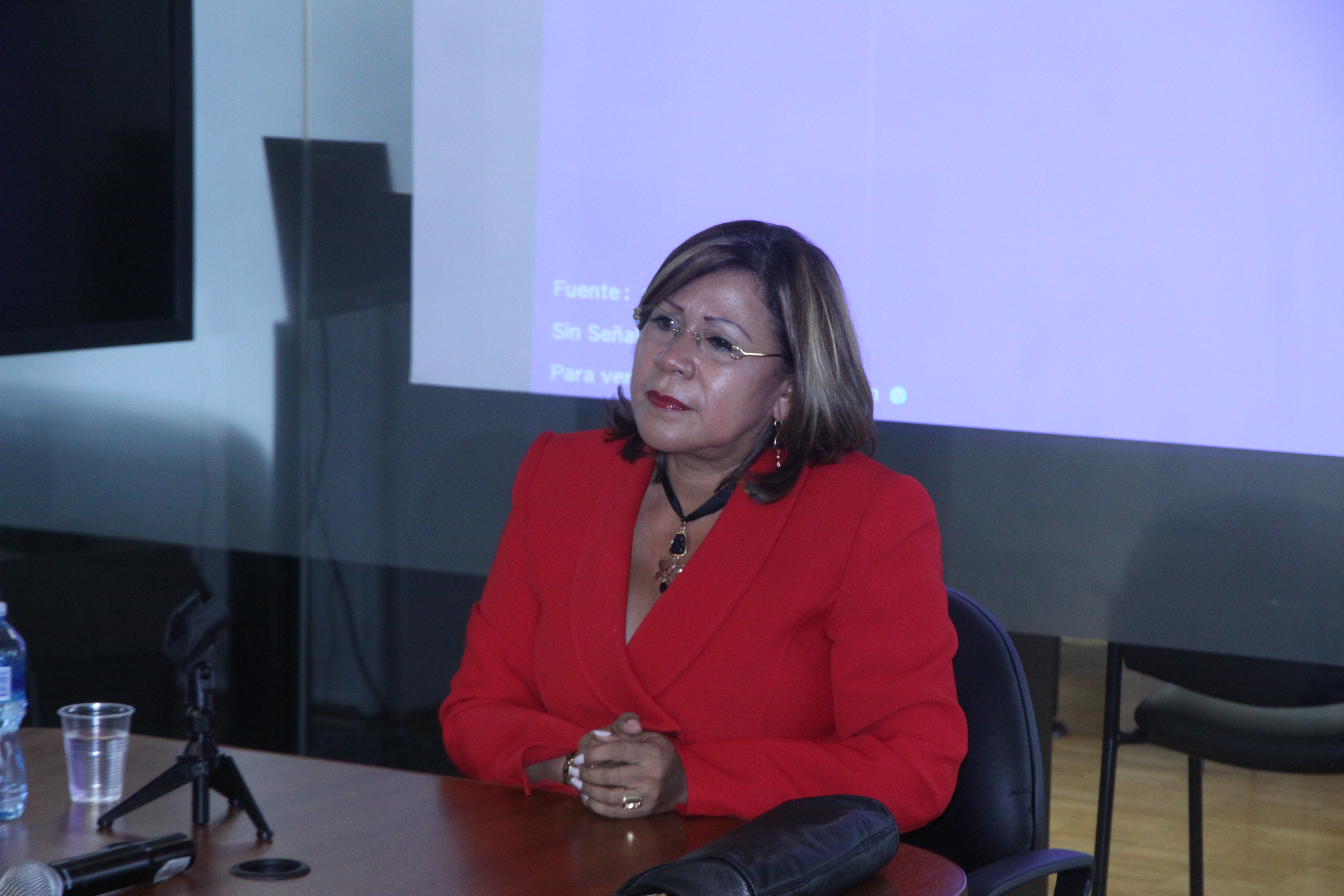 Foto: Hugo Ortiz Ron / Asamblea Nacional